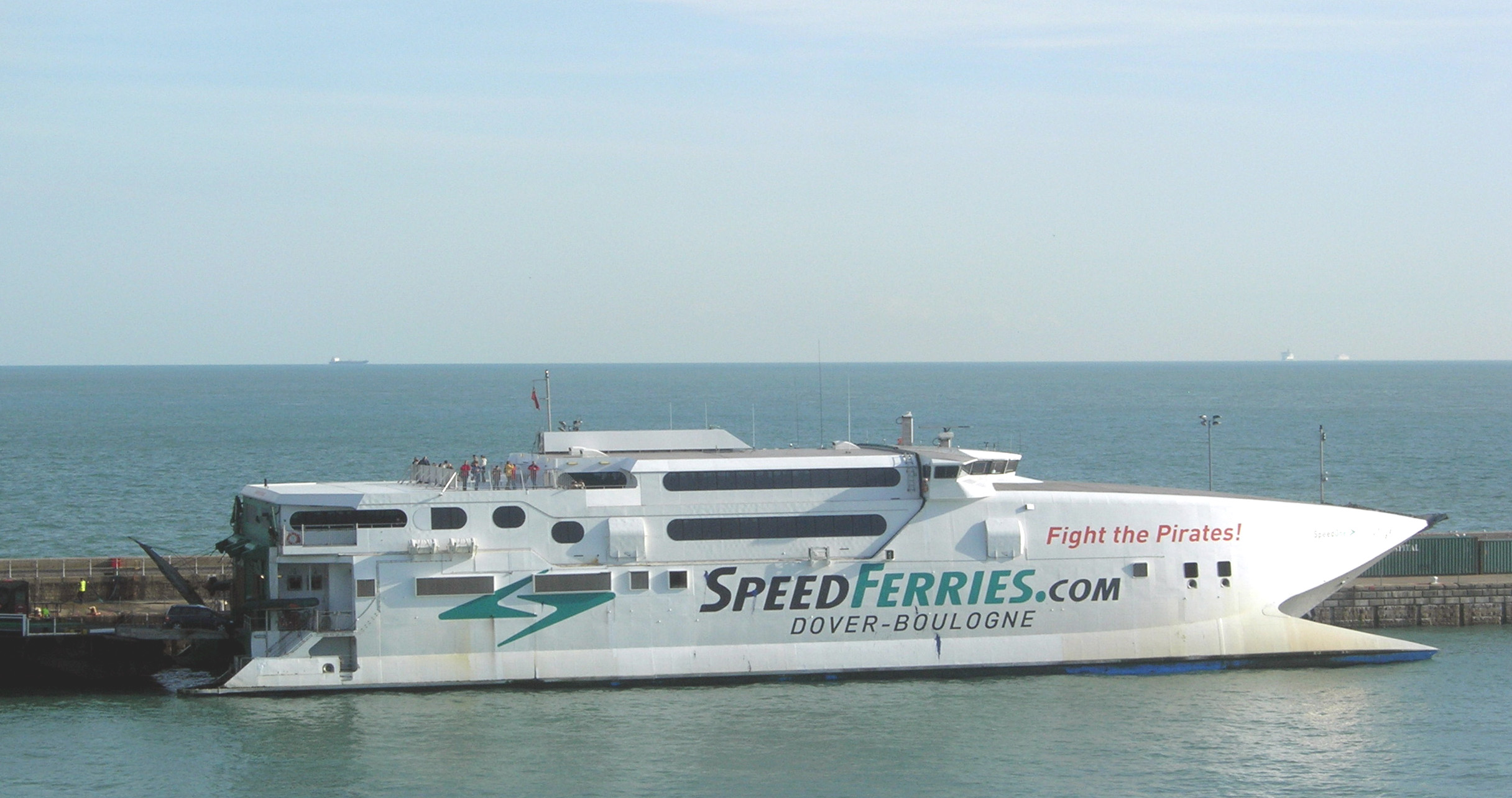 SpeedOne dans le port de Douvres